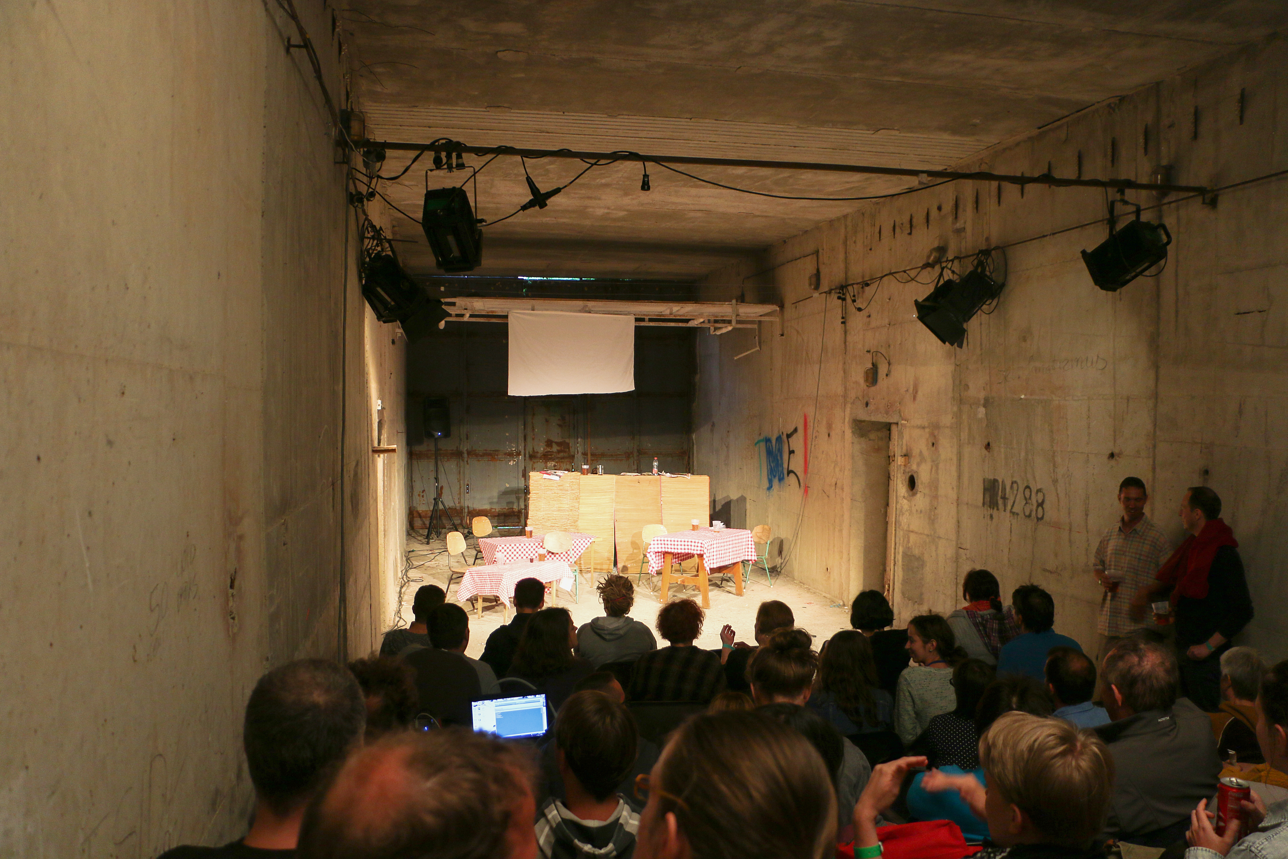 A Zsámbéki Színházi és Művészeti Bázis egyik helyszíne a Sárkánytivornya című előadás előtt - Y.EAST cseh-magyar színházi és zenei fesztivál